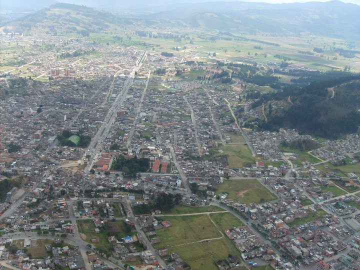 Av. Las Américas